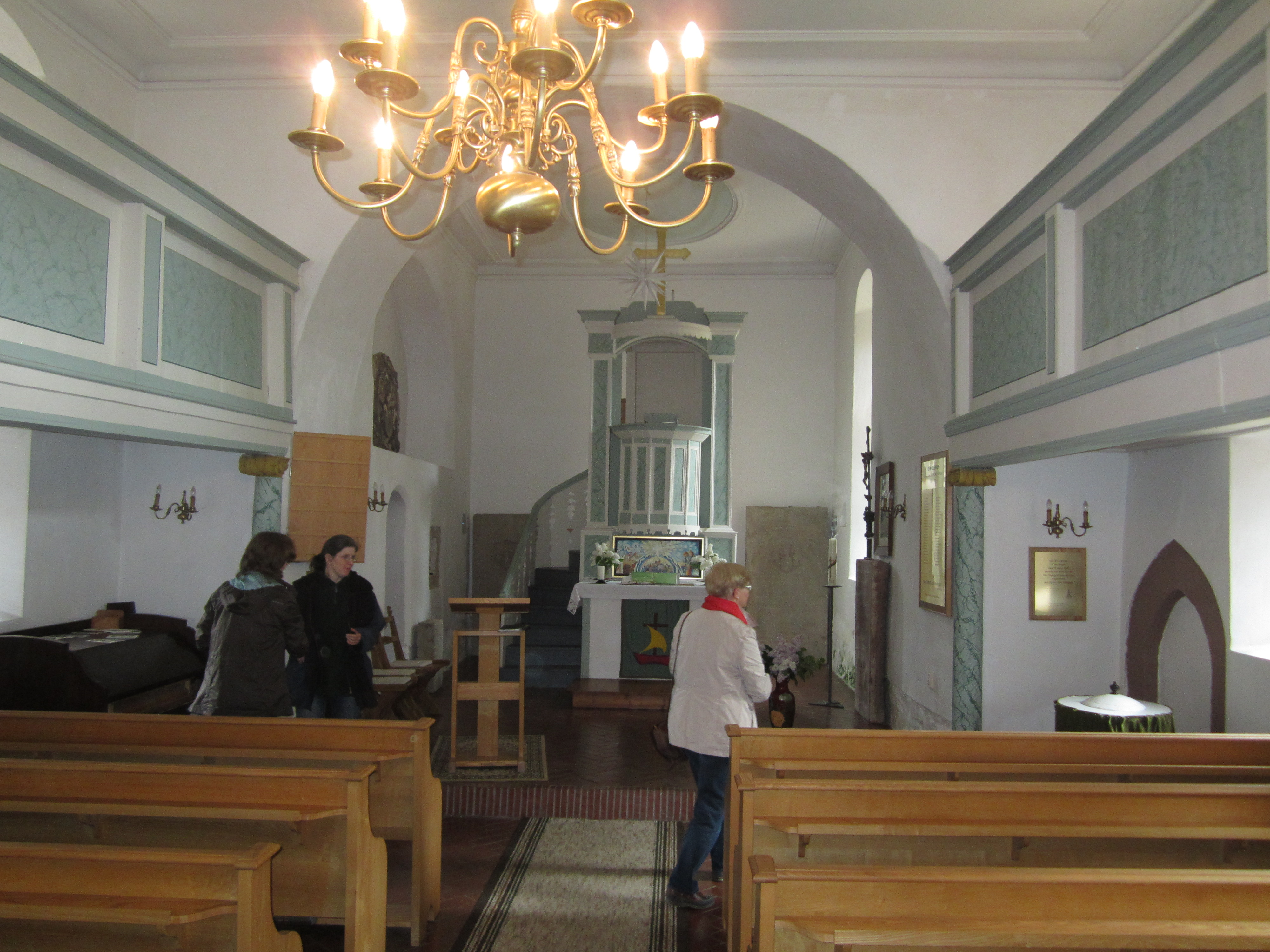 Innenansicht Heilig-Kreuz-Kirche, Blick auf den Altar